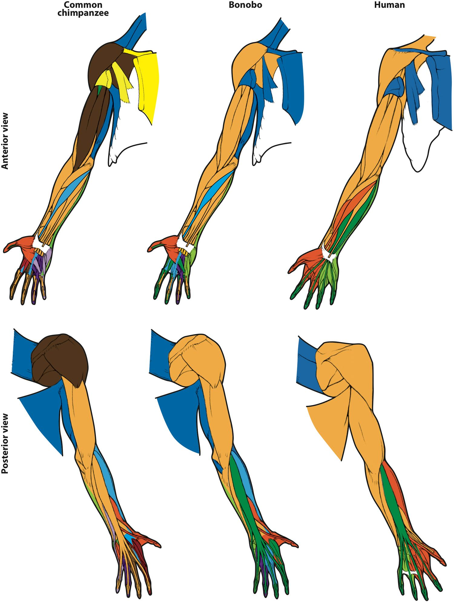 L'organisation modulaire des membres antérieurs et postérieurs d'hominidés est révélateur d'une évolution en mosaïque avec certains caractères évolués et d'autres qui le sont moins.